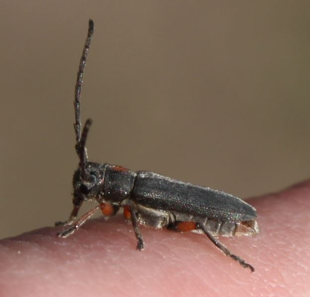 Schafgarben-Böckchen (Phytoecia pustulata) am 18. April 2019 nahe Heidelberg